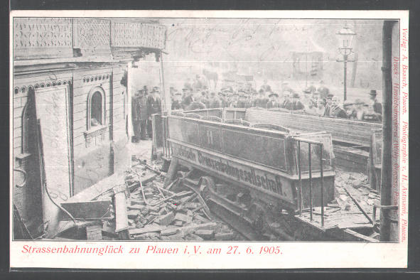 Straßenbahnunglück in Plauen 1905